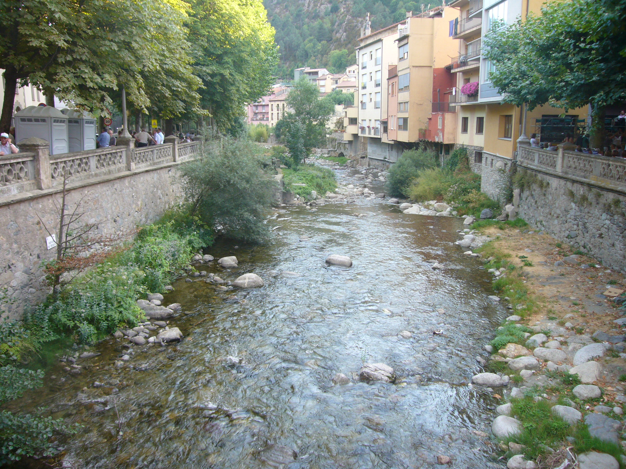 Riu Freser (passeig del Taga)